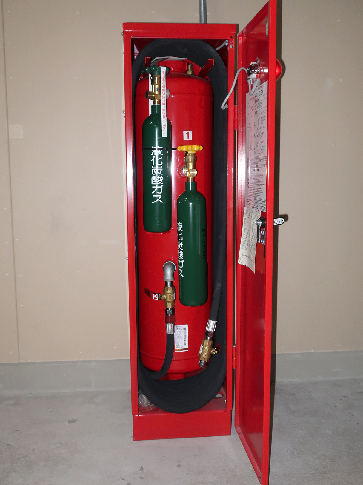 炭酸ガスカートリッジ駆動型粉末消火器（日本の消防法の区分では移動式粉末消火設備）